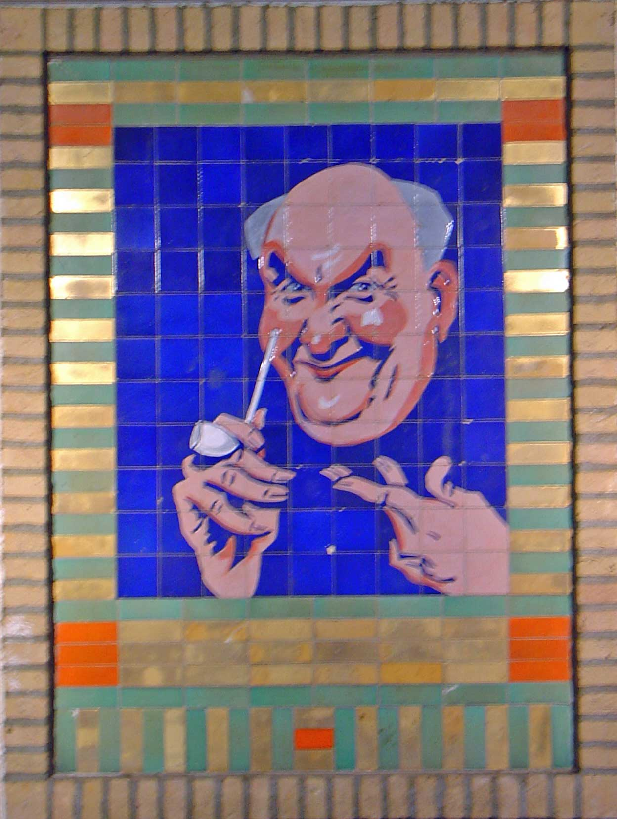 Tegeltableau van de pijproker door Willem van Norden (waarschijnlijk een ontwerp van Pieter van der Hem) in het station van Gouda. Afkomstig van het N.V. Goedewaagen's Koninklijke Hollandsche pijpen- en aardewerkfabrieken pand aan het Jaagpad en na de sloop van het pand geplaatst in het NS station